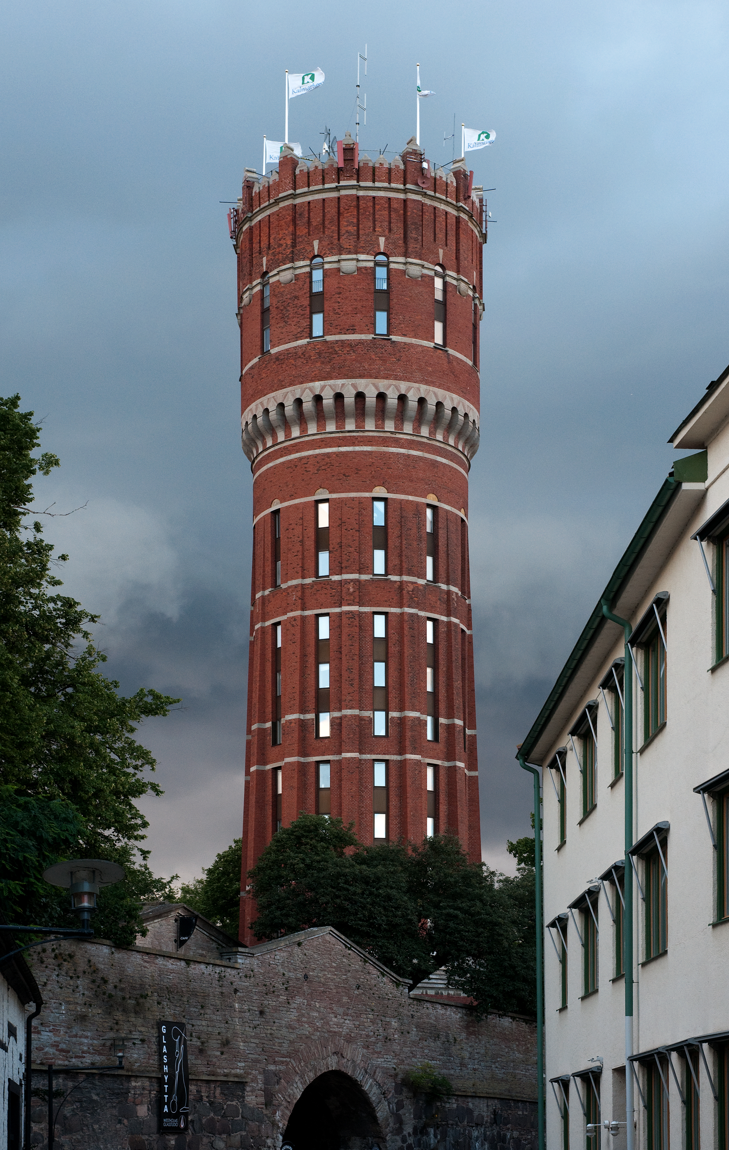 Kalmar gamla vattentorn 2010.